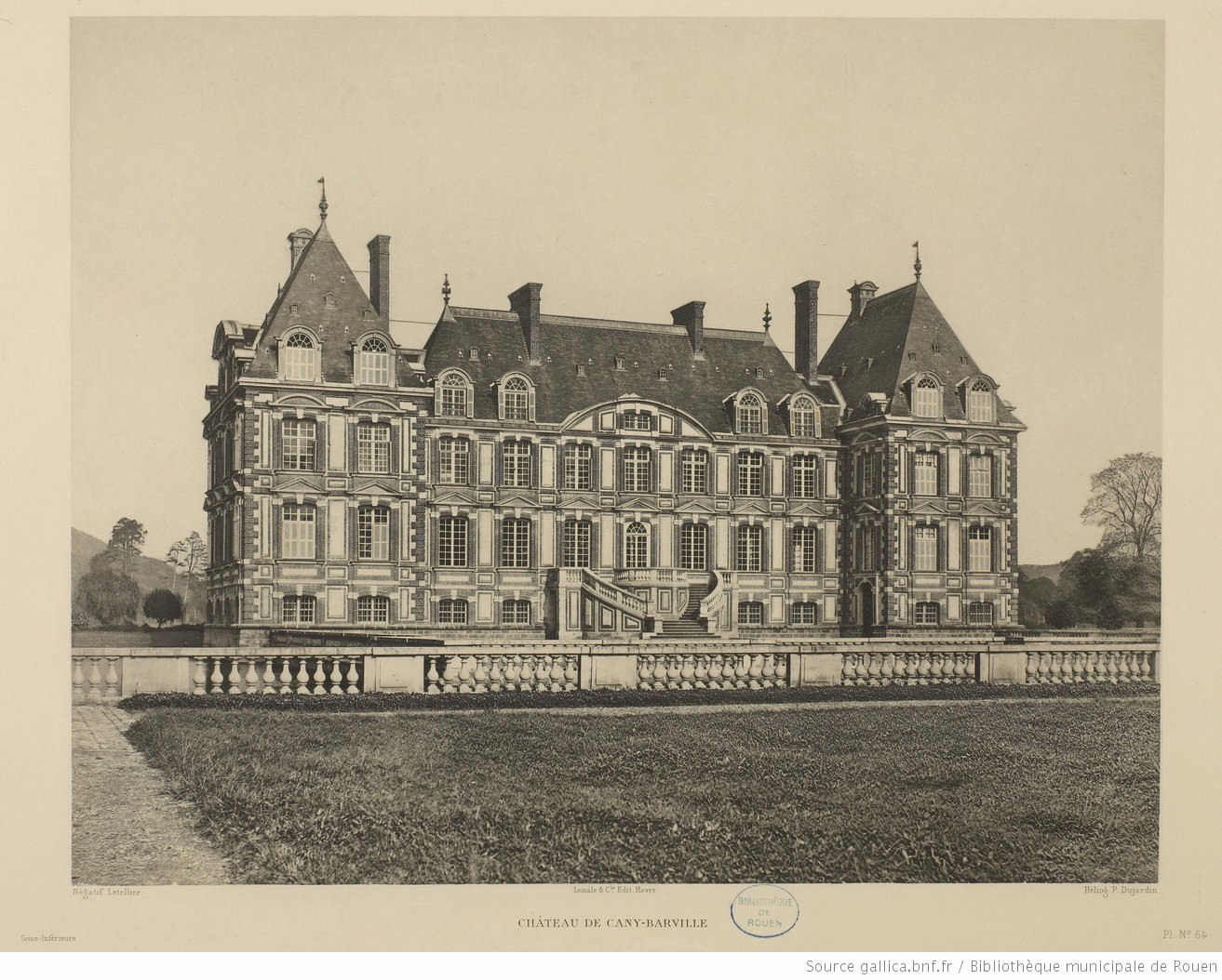 Dessin du château en 1893